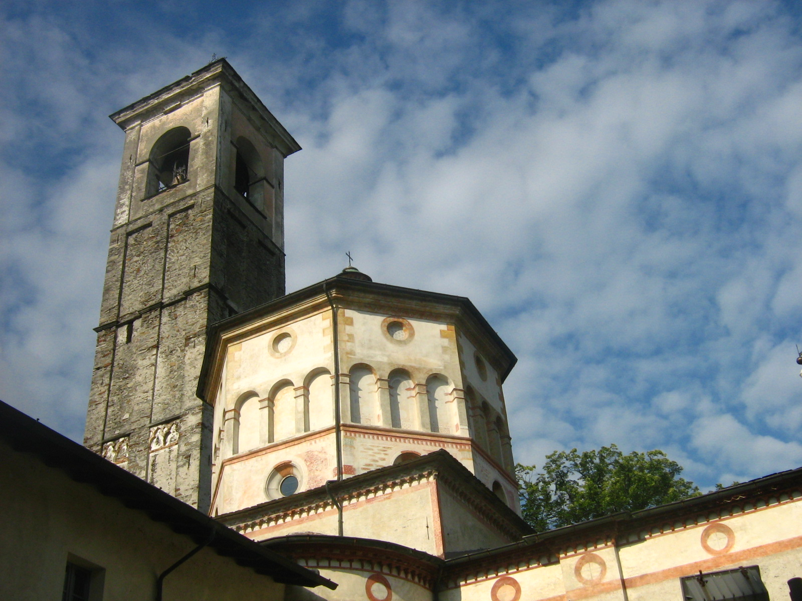 Morbegno. Il Santuario della Vergine Assunta